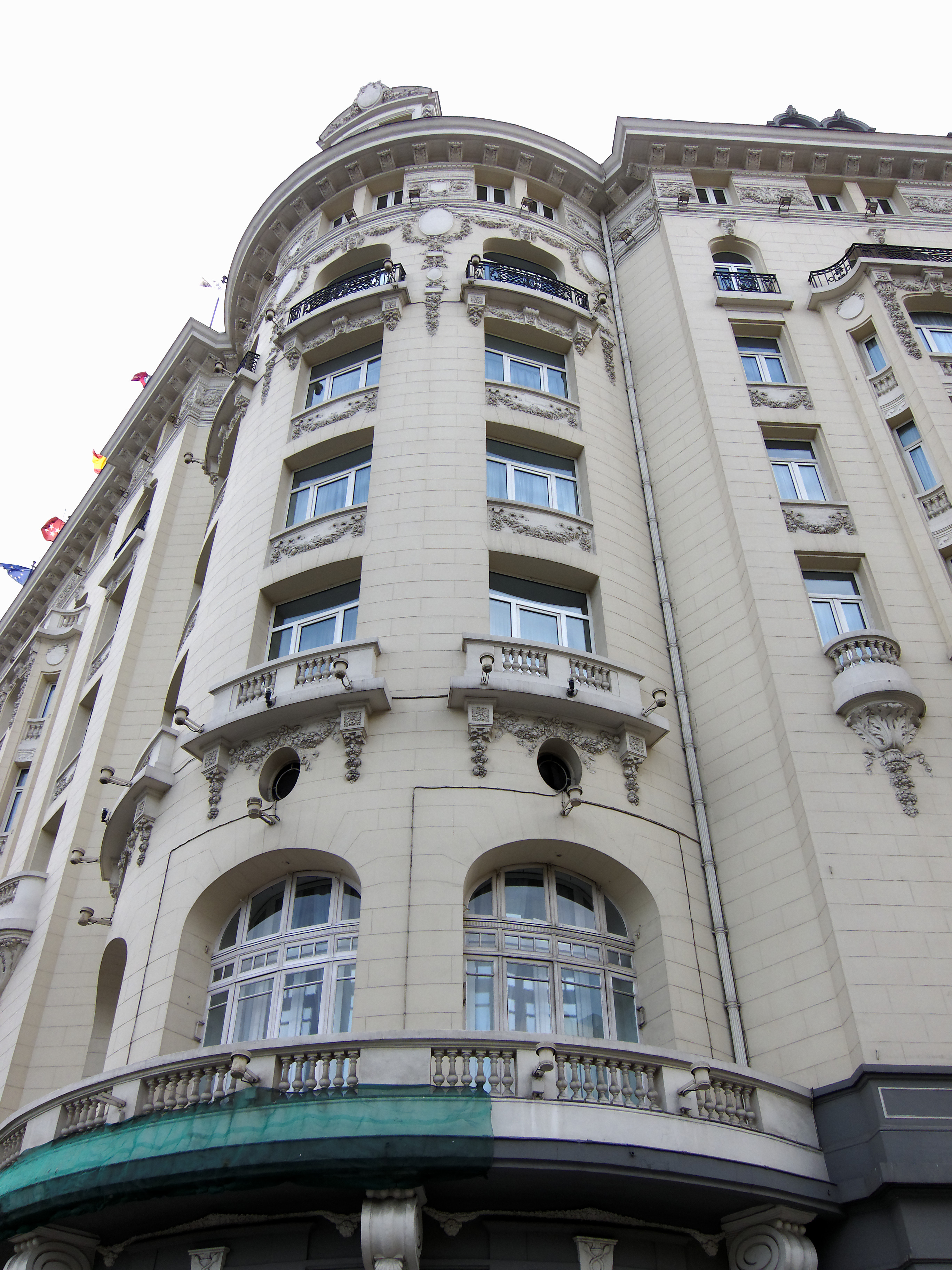 Parte de la fachada del Hotel Palace, Madrid.